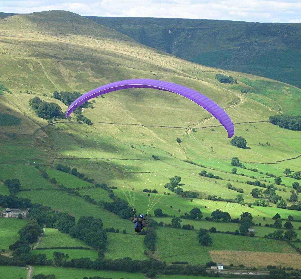 Paragliding at Mam Tor